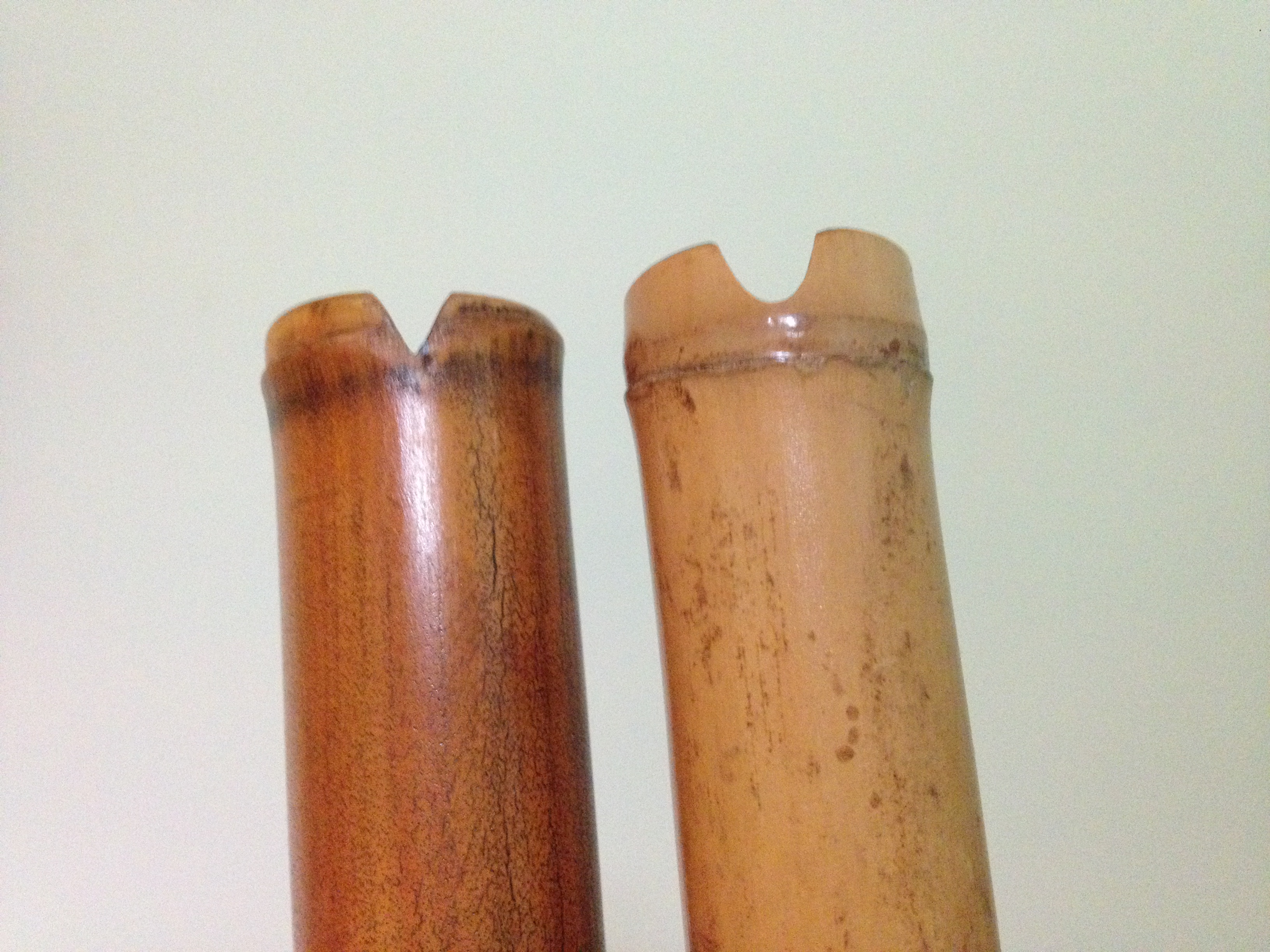 洞蕭的吹口：V口和U口